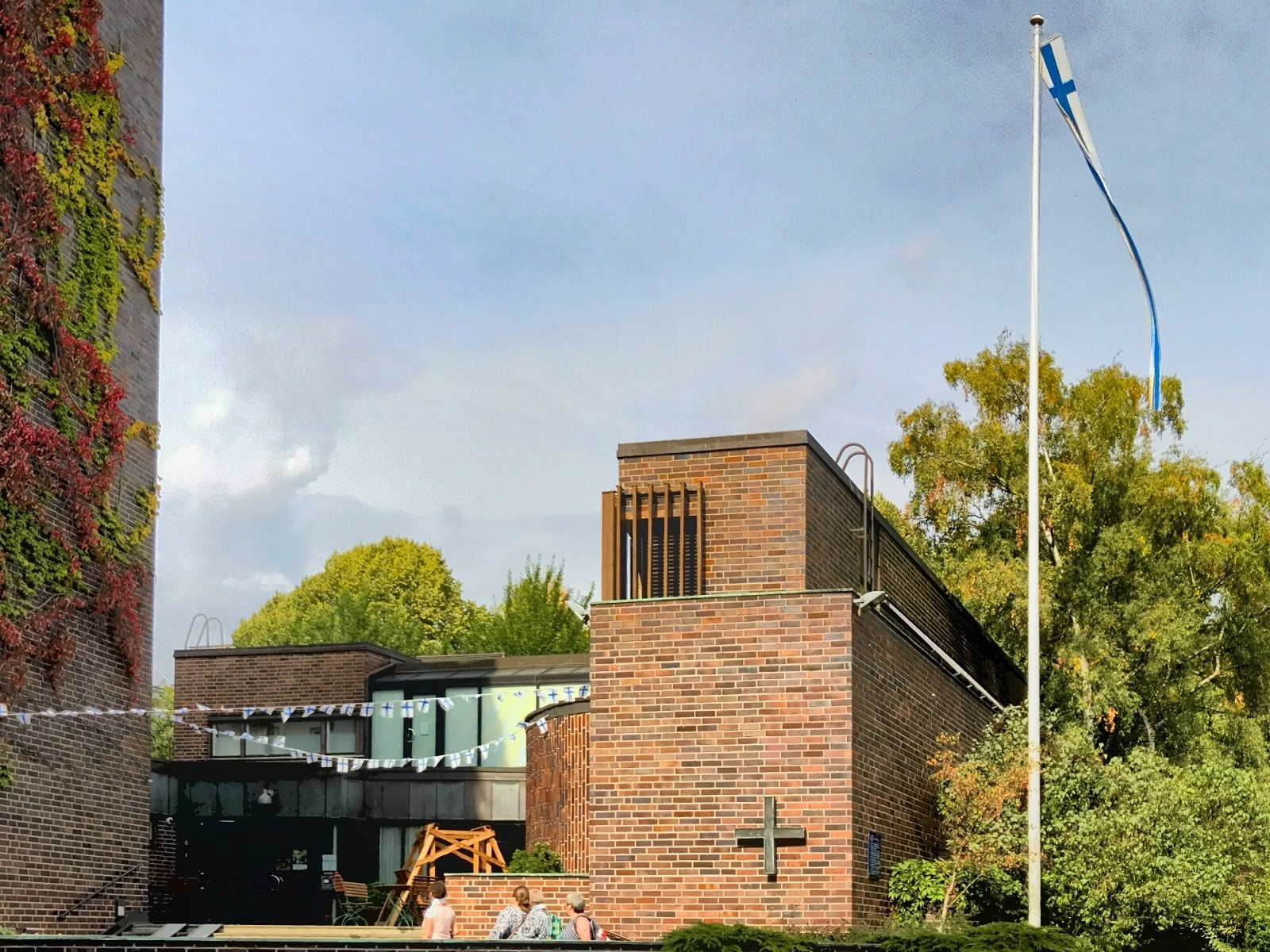 Finnische Seemannskirche in Hamburg